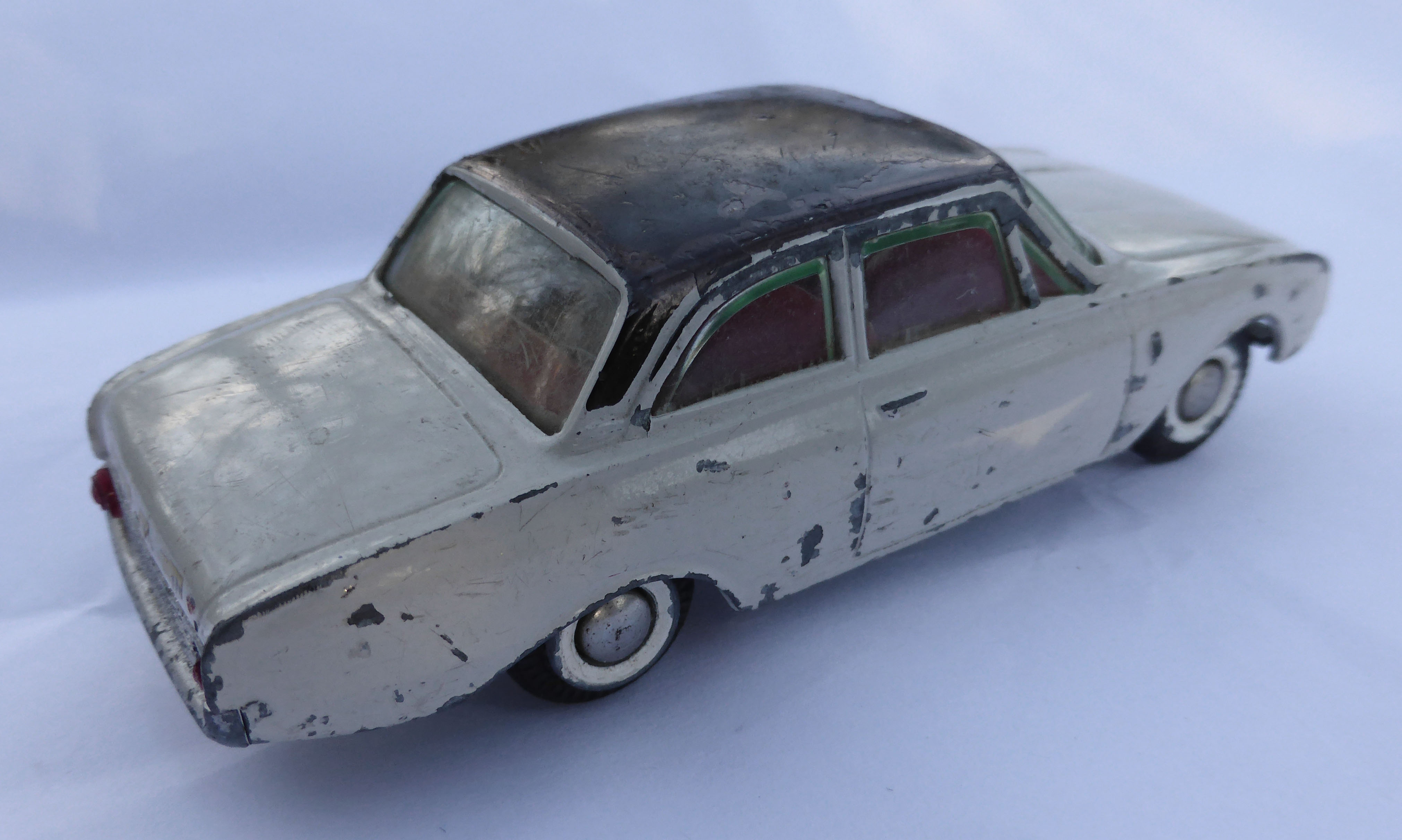 Modell des Form 17M von Tekno.